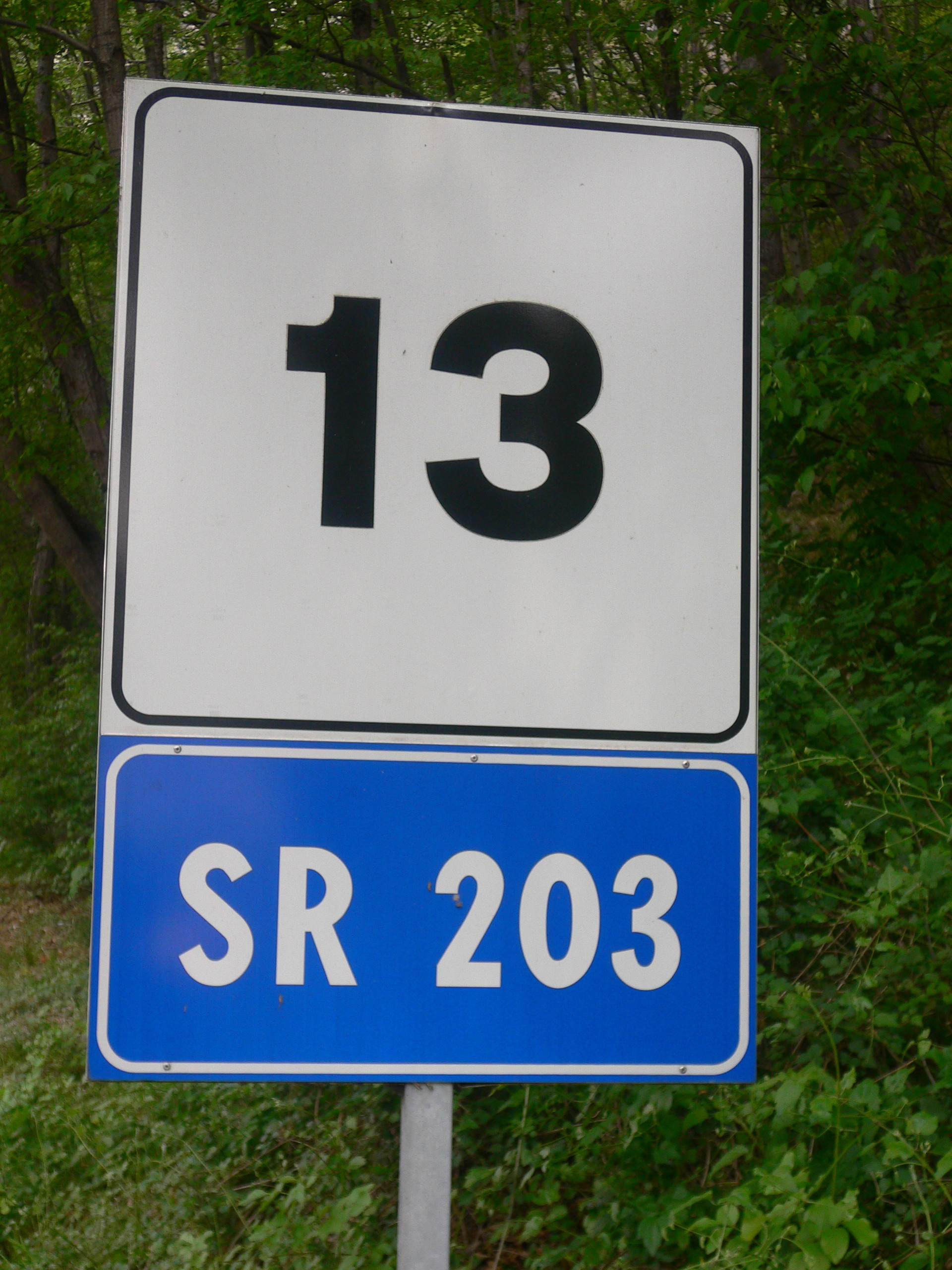 Progressione chilometrica sulla SR 203 Agordina